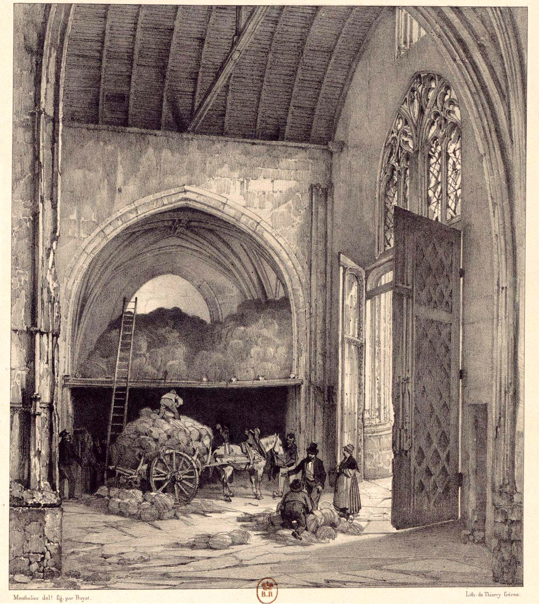 Senlis (Oise), ancienne église Saint-Pierre, nef, 1re travée, vue vers le nord, par Alexandre-Jules Monthelier et Adolphe-Jean-Baptiste Bayot, vers 1836-1854.